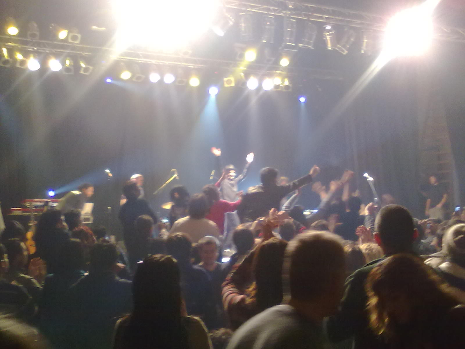 el guitarrista de la celebre vanda argentina virus al final de su recital